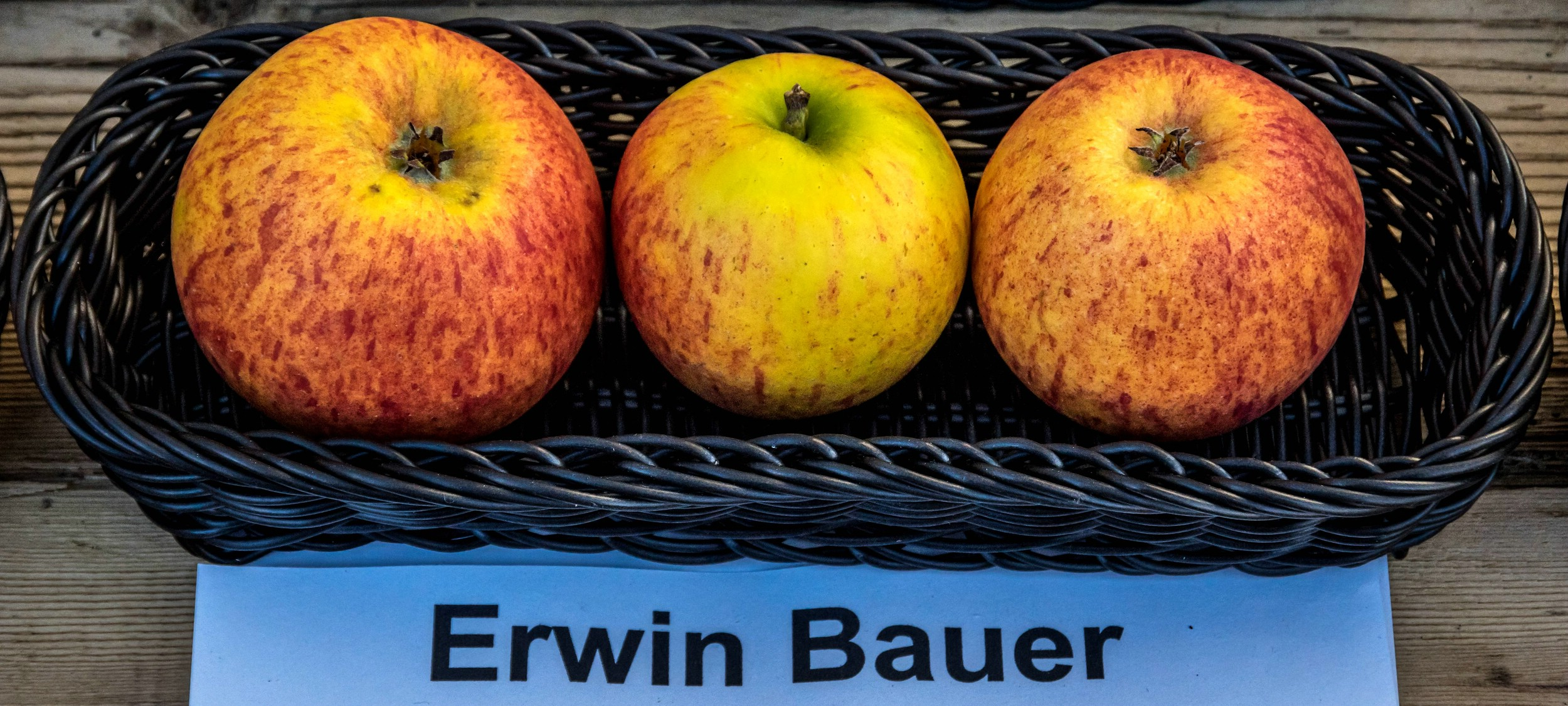 Alte Apfelsorten, von denen es im Badischen noch tragende Bäume gibt. Alle Aufnahmen au dem Oktober 2015